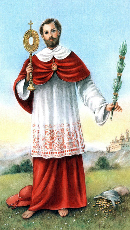 Santo católico São Raimundo Nonato tem suas vestimentas túnicas nas cores vermelhas, idealizada inicialmente para ser a cor do clube